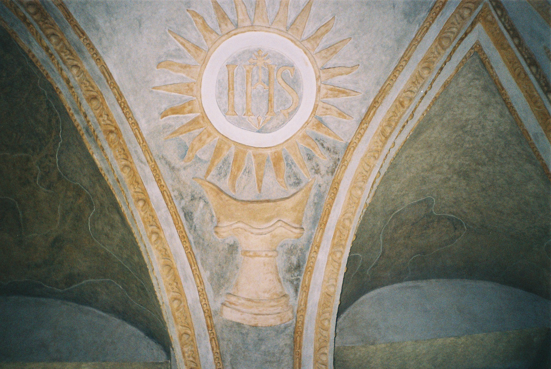 kamienica Gruszewiczów - wnętrze 12